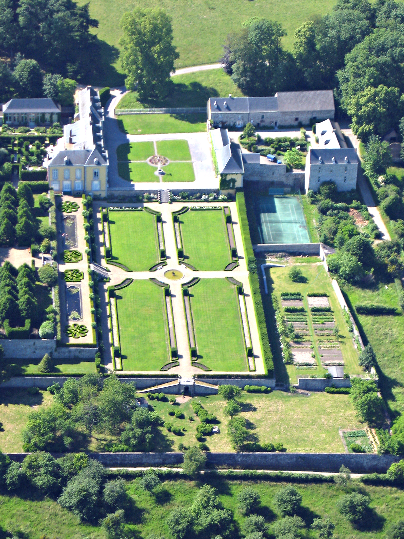 Ensemble formé par le Château David de Lossy et les terrains environnants